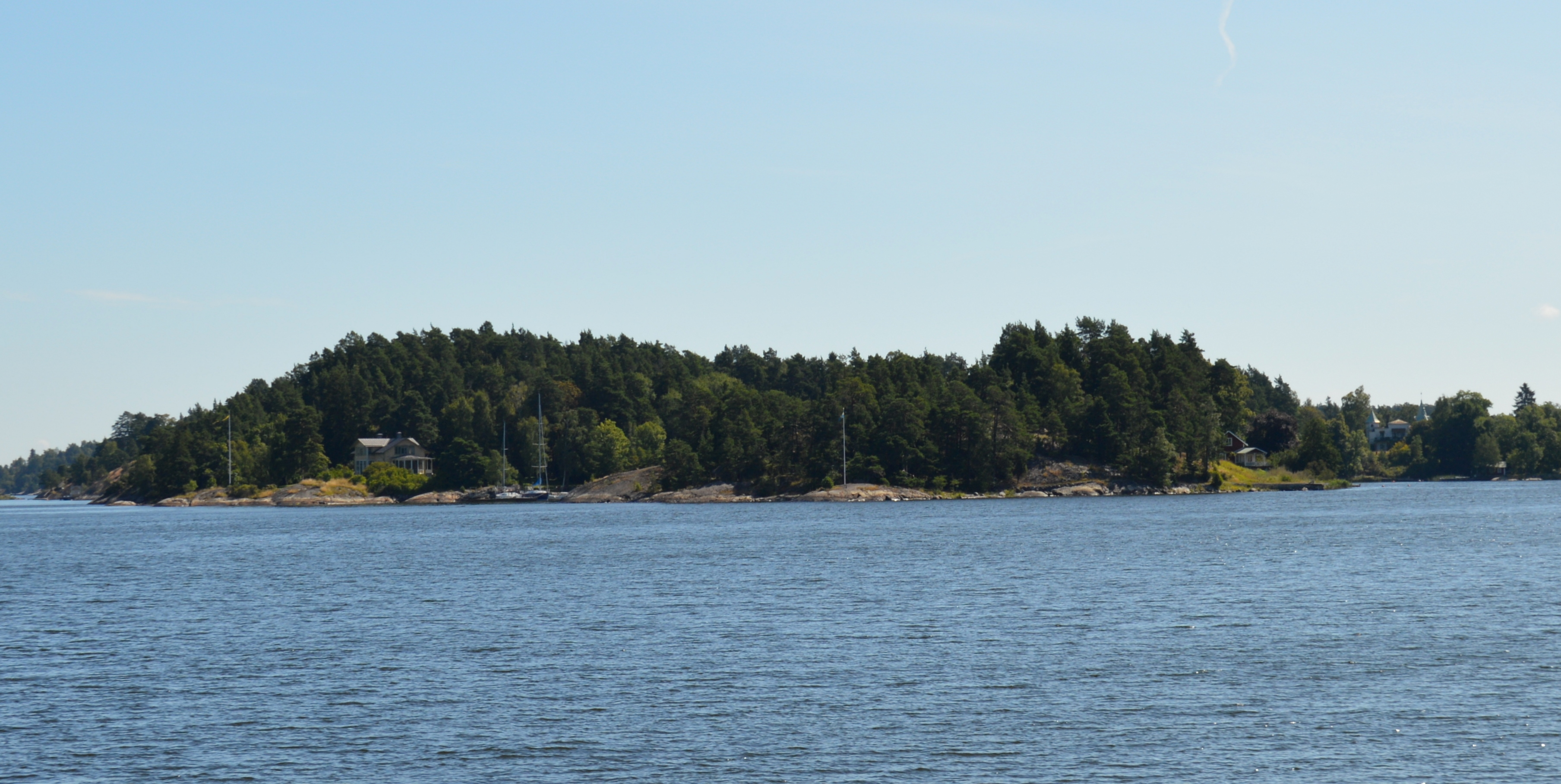 Insel Tegelön